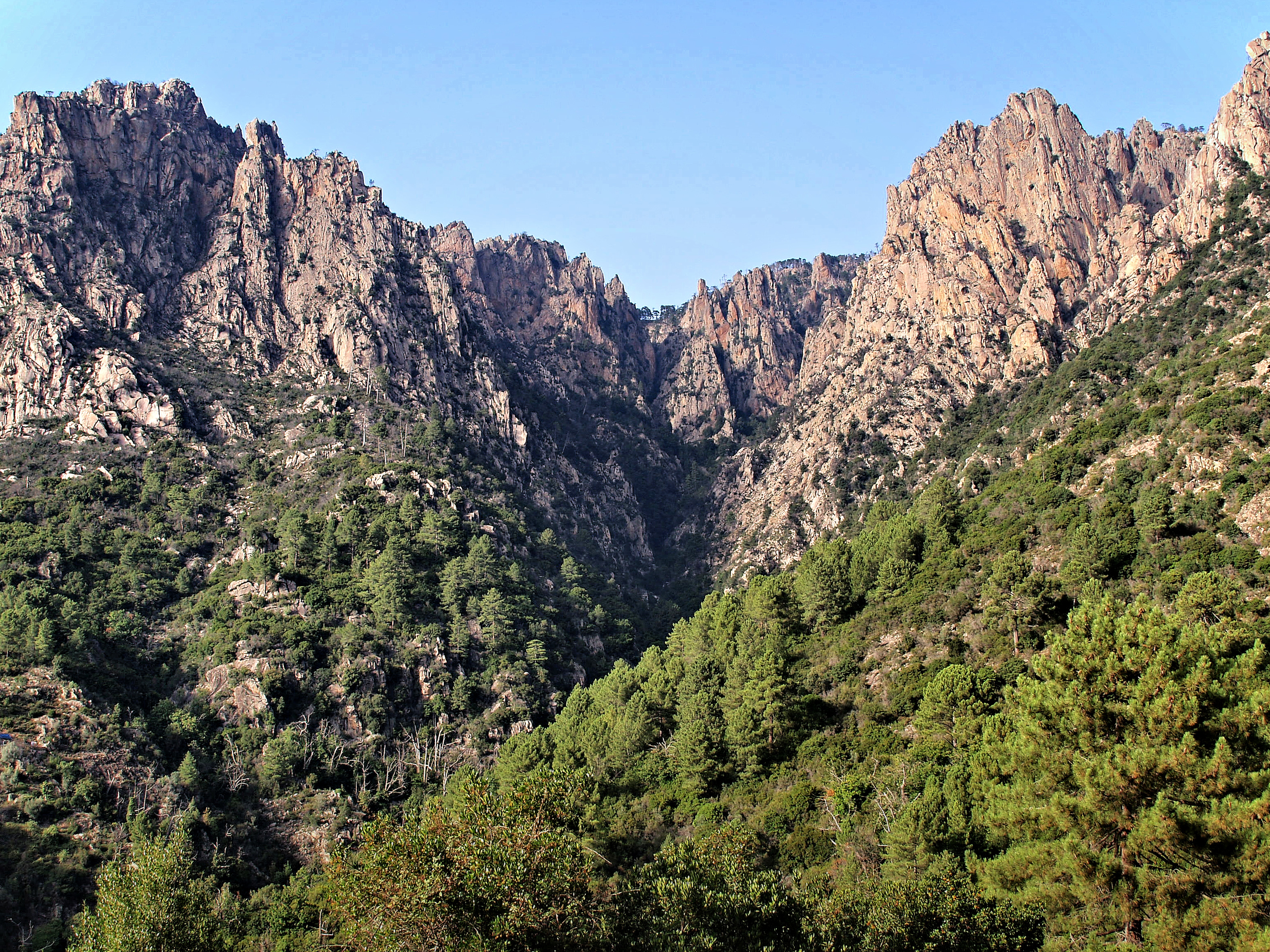 Murzo, Ouest Corse (Corse) - Vue des Punta di a Spusata (1 191 m) et Monte a u Capu (1 238 m)